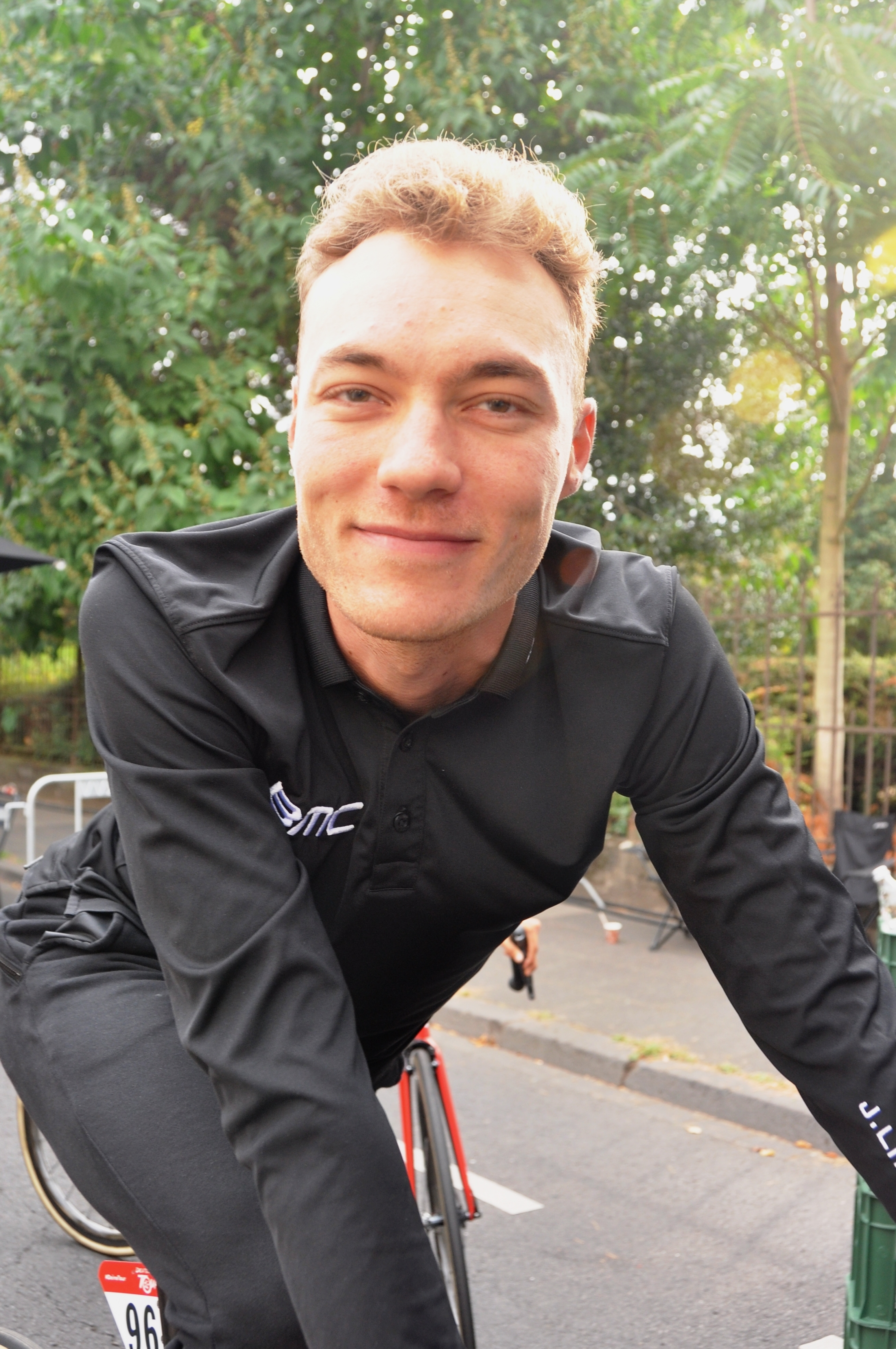 Loïc Vliegen, belgischer Radrennfahrer